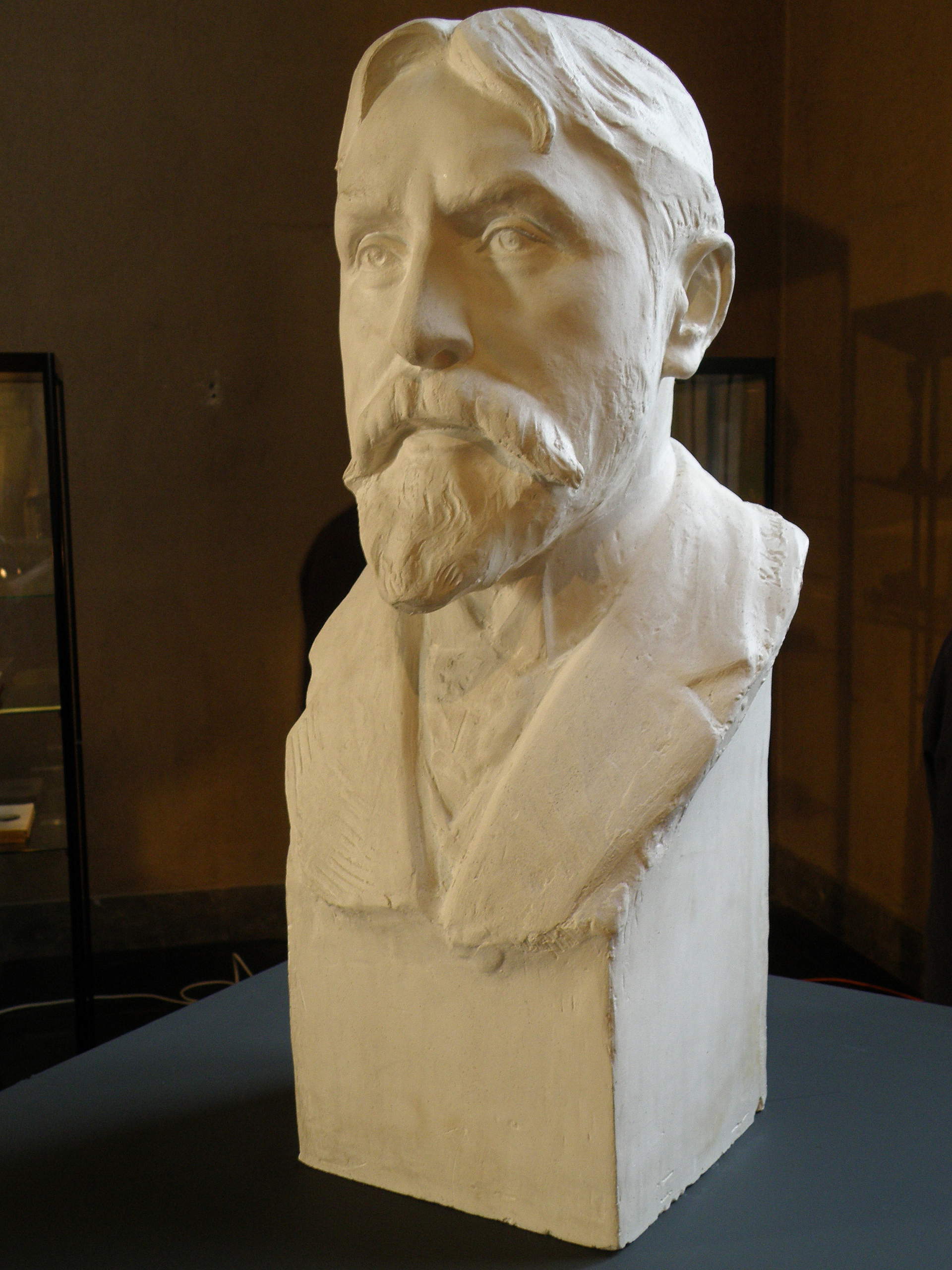 Buste de l'architecte belge Jef Huygh, par le sculpteur Rik Sauter (décennie 1930).